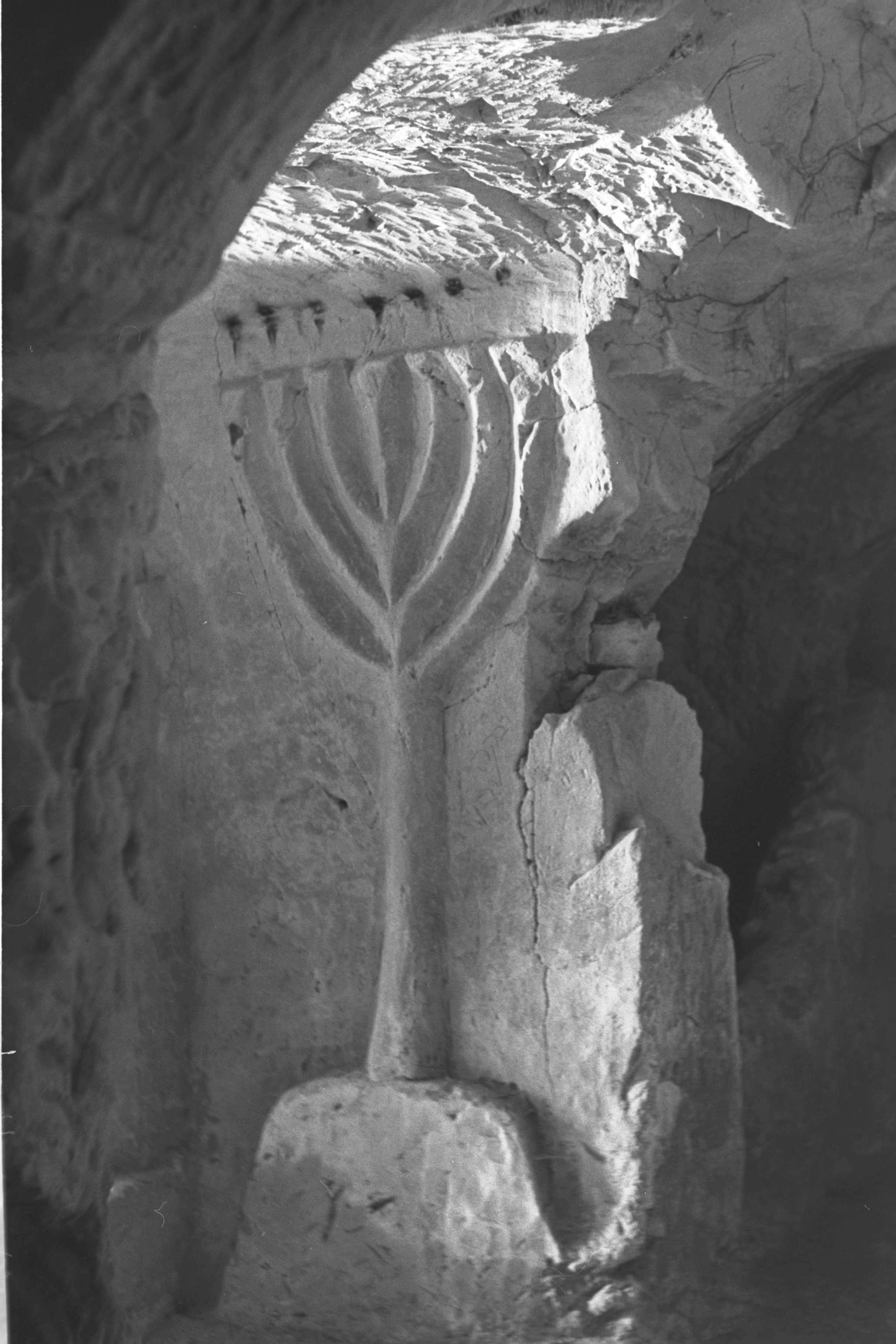 Carvings on the wall of the burial chambers at the Beit Shearim caves in the Yizreel Valley. גילוף של מנורה על קיר במערת קבורה שנמצאה בבית שערים, ליד עמק יזראל